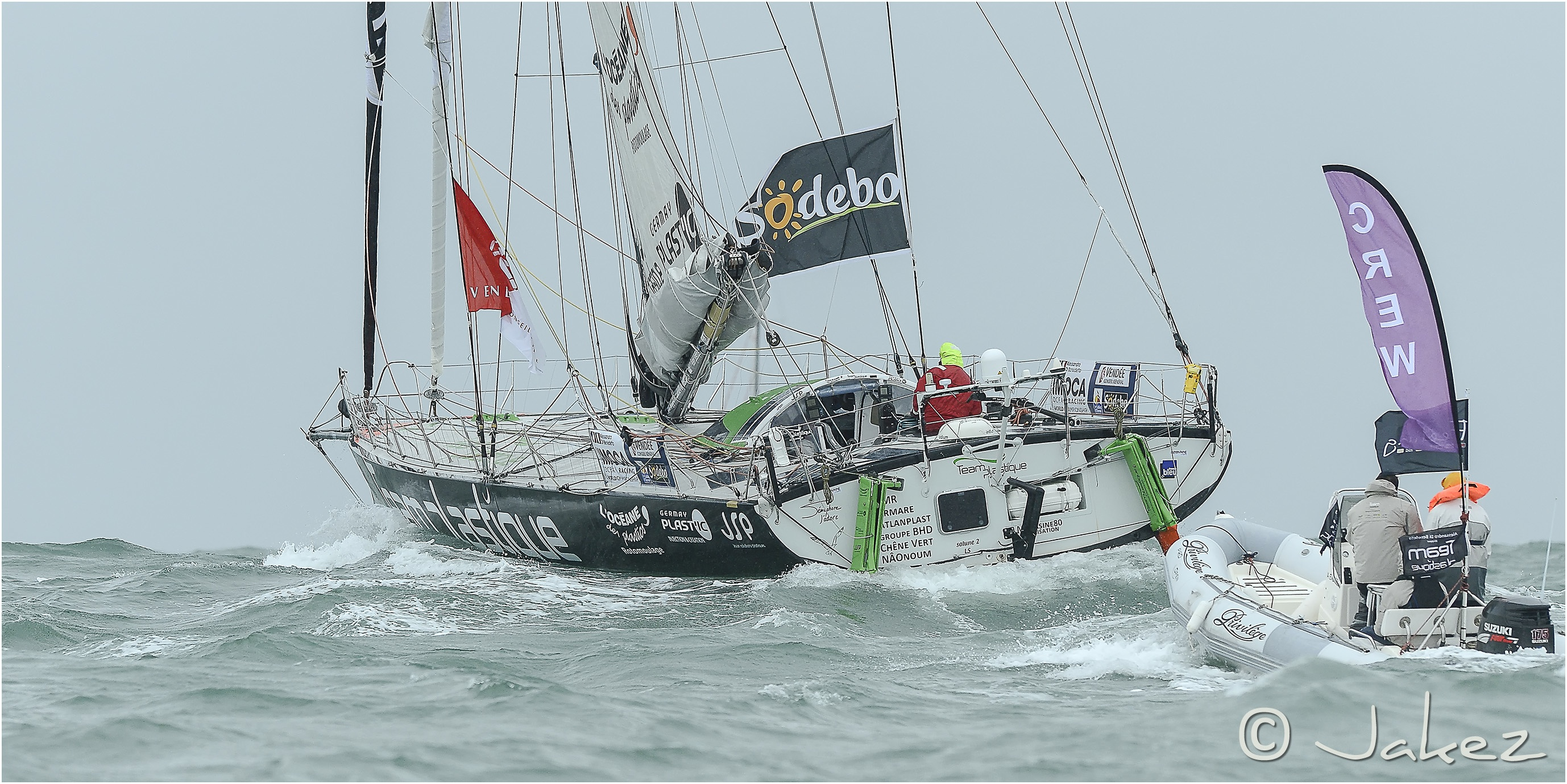 0290-Vendée 2012 (Départ)